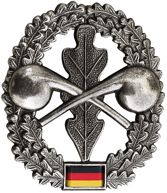 Barettabzeichen der ABC-Abwehrtruppe der Bundeswehr Barettfarbe: Korallenrot Maße: Hoch: 53mm Breit: 46mm Ausführung: altsilber, Metall